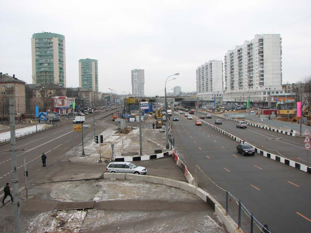 Вид на проспект Маршала Жукова в Москве.